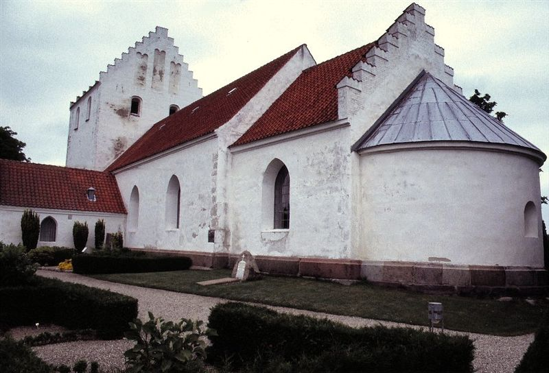 Landet Kirke (Svendborg Kommune) i Danmark. Landet kirke